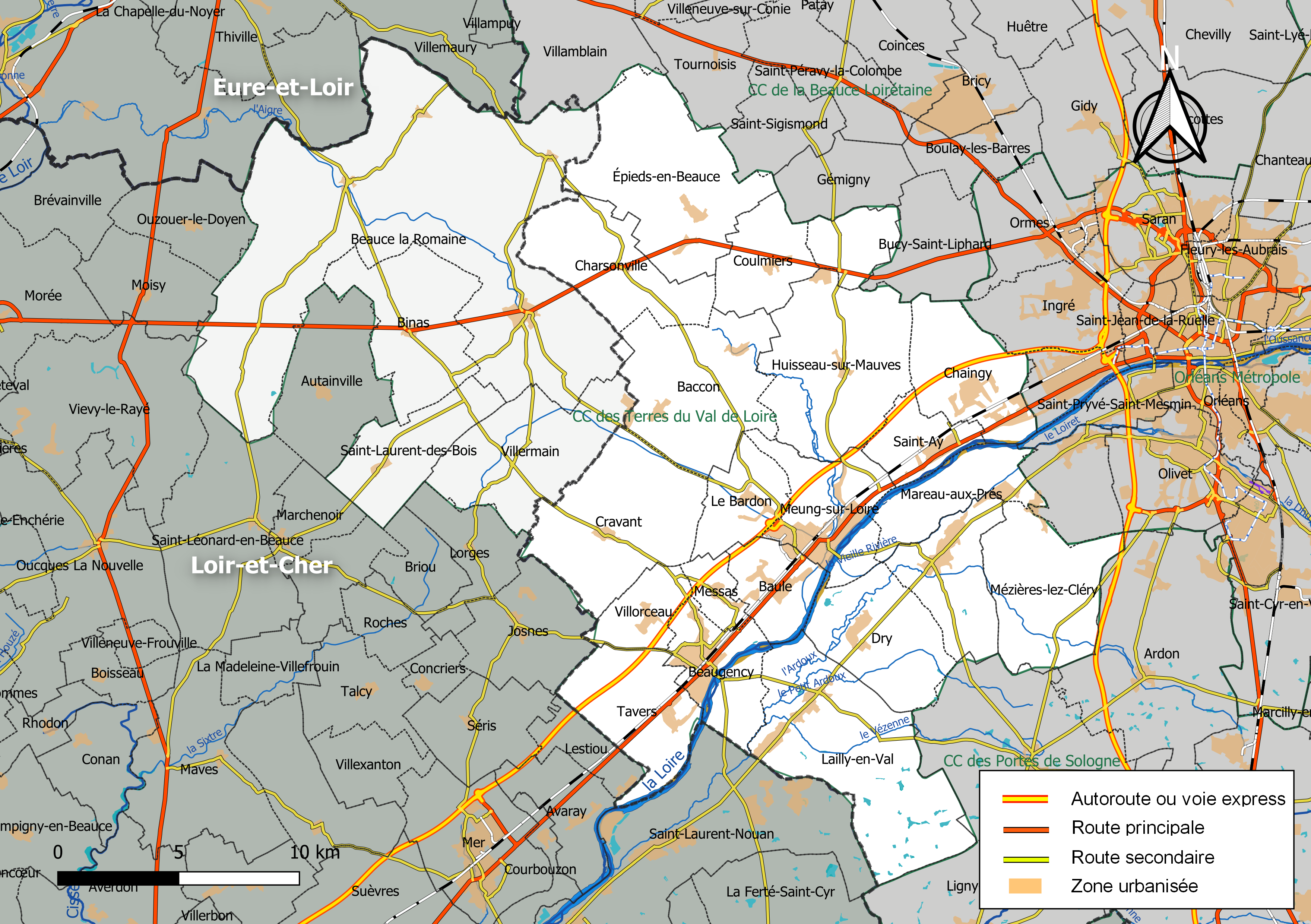 Carte géographique de la communauté de communes des Terres du Val de Loire, département du Loiret, France. Composition au 1er janvier 2019.